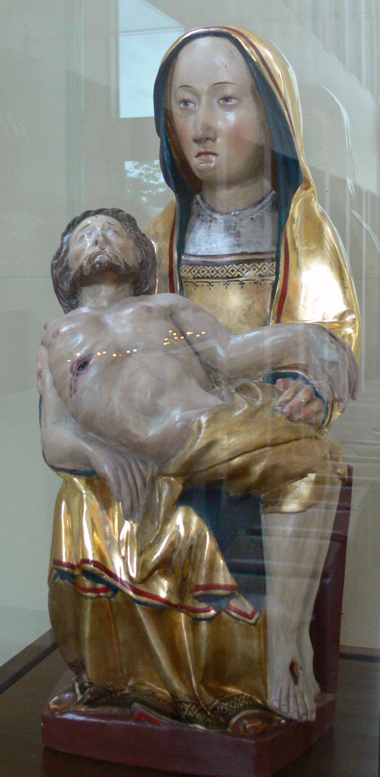 Pietà aus dem 16. Jahrhundert, Autobahnkapelle im Hegau, Bundesautobahn 81, Engen, Landkreis Konstanz